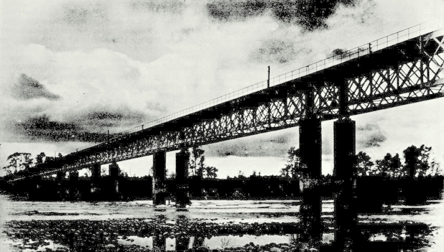 Imagen en Chile descripción física, política, social industrial y comercial de la República de Chile, por Carlos Tornero.1903